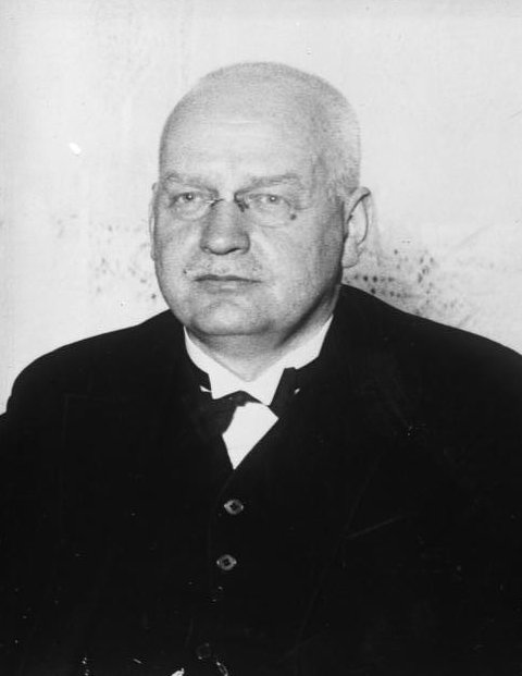 Der ehemalige deutsche Reichskanzler Dr. Hans Luther voraussichtlicher Kandidat für den Reichsbankpräsidenten ! Der ehemalige deutsche Reichskanzler Dr. Hans Luther welcher sich um den Posten als Reichsbankpräsident bewirbt.